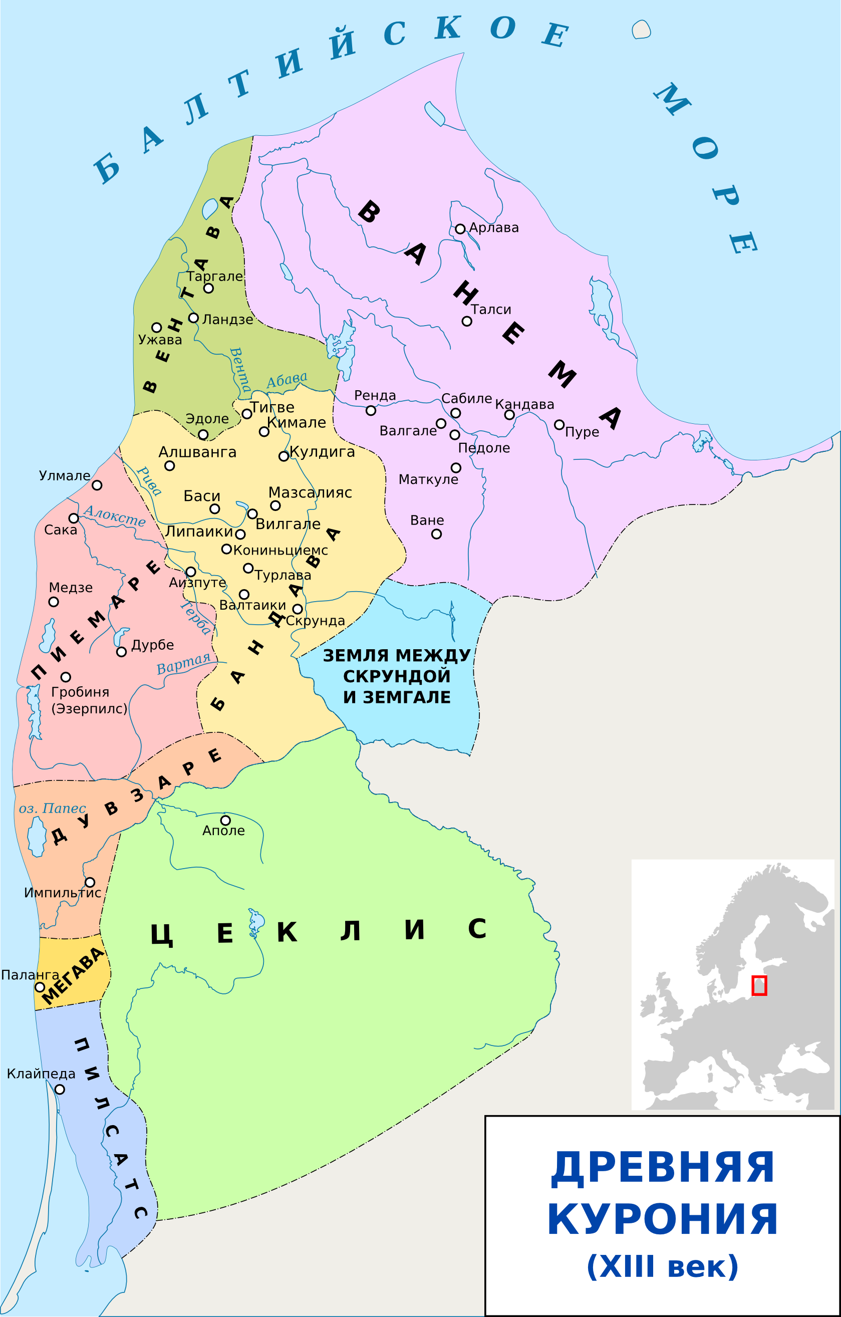 Карта Куронии XIII века